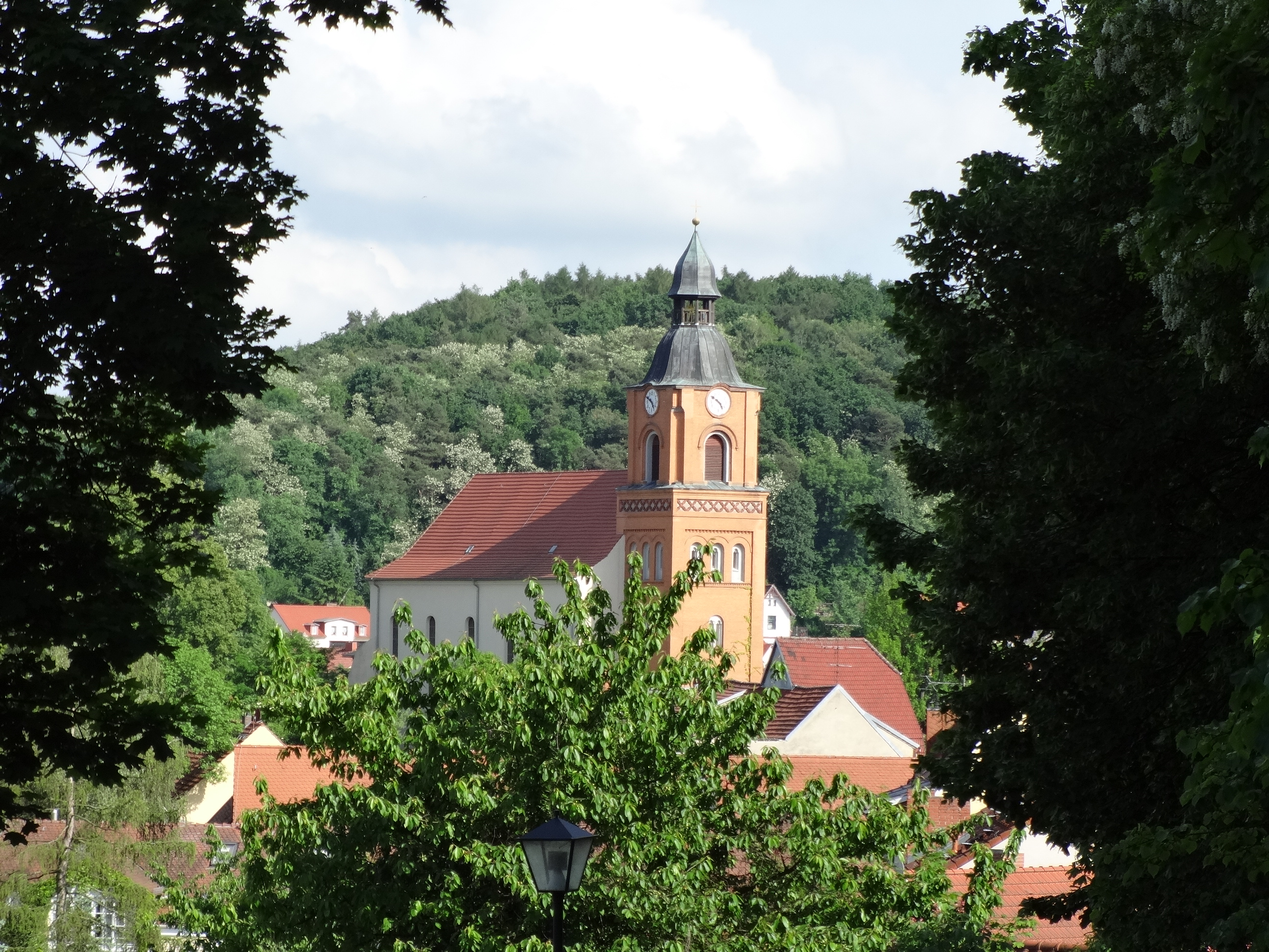 Mittelalterliche Stadtpfarrkirche in Buckow (Märkische Schweiz) in Märkisch-Oderland, Brandenburg Durch Brände 1665 und 1686 zerstört und wieder aufgebaut wurde sie im Zweiten Weltkrieg erneut zerstört und aufgebaut.